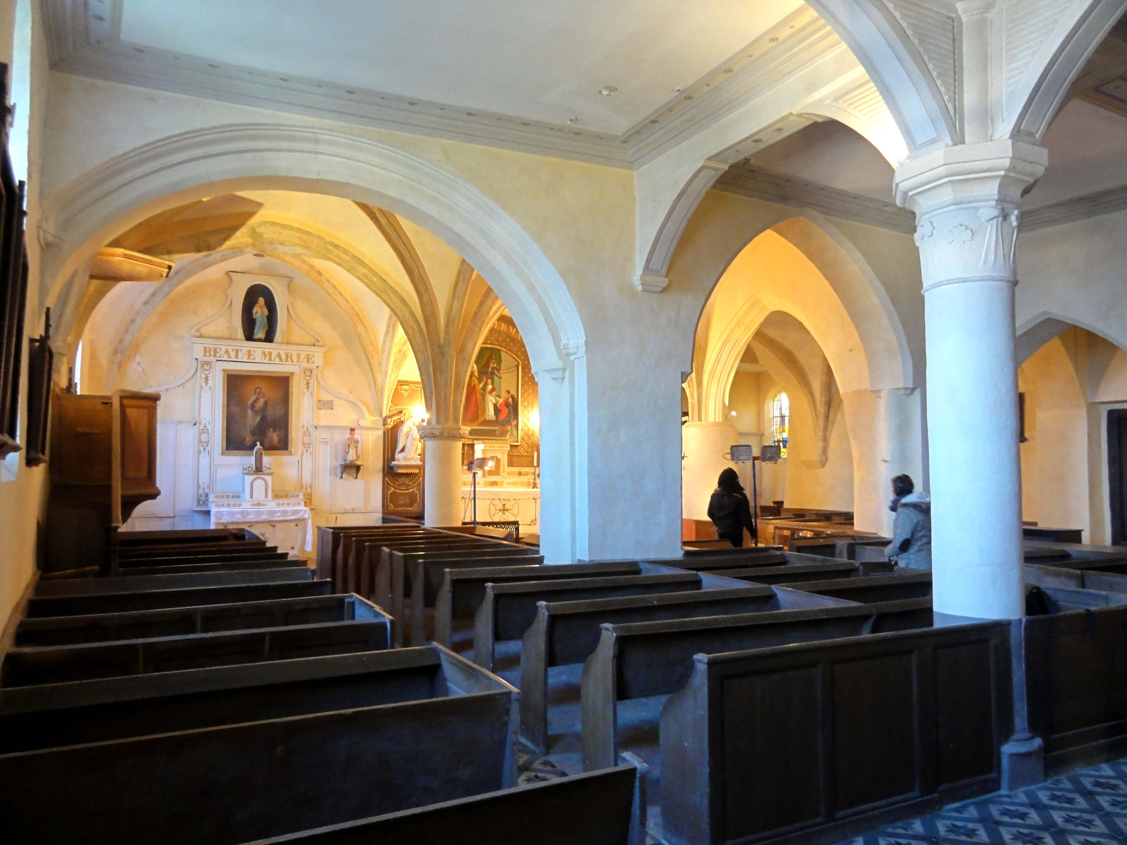 Intérieur de l'église - voir titre.